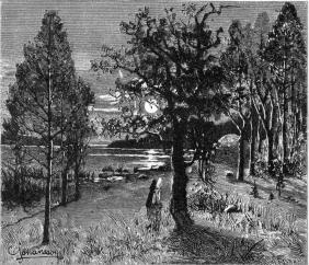 Sigrun waiting